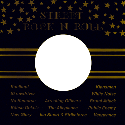 Logo von Street Rpck'n'Roll